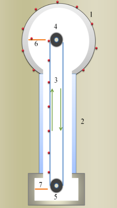 Irudian ikusi dezakegu zeintzuk diren generatzailearen aldagaiak